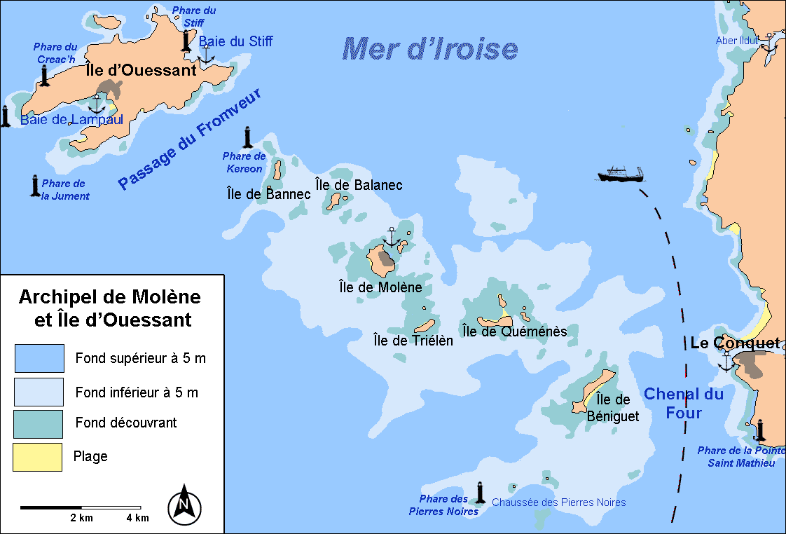 Géographie des îles dans l'Archipel de Molène.